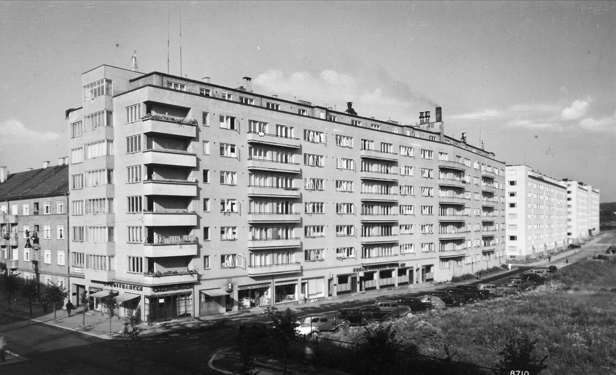 Suhms gate mot nordvest fra Kirkeveien